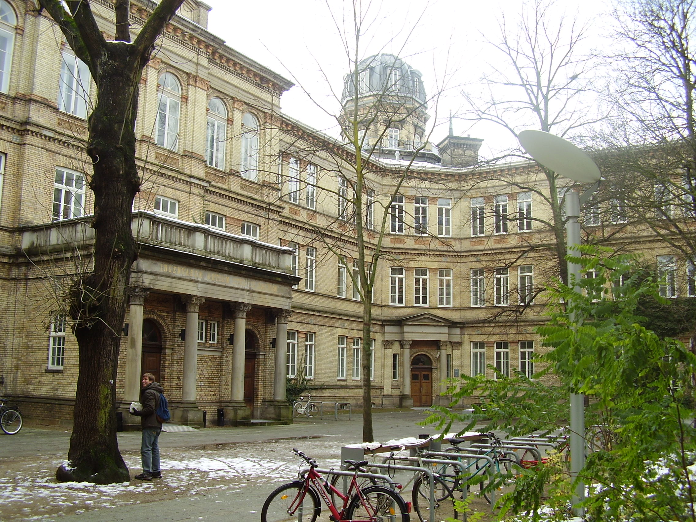 Gebäude des Fachbereichs Musik der Hochschule für Künste Bremen in der Dechanatstr. 13/15 (ehemaliges Altes Gymnasium)